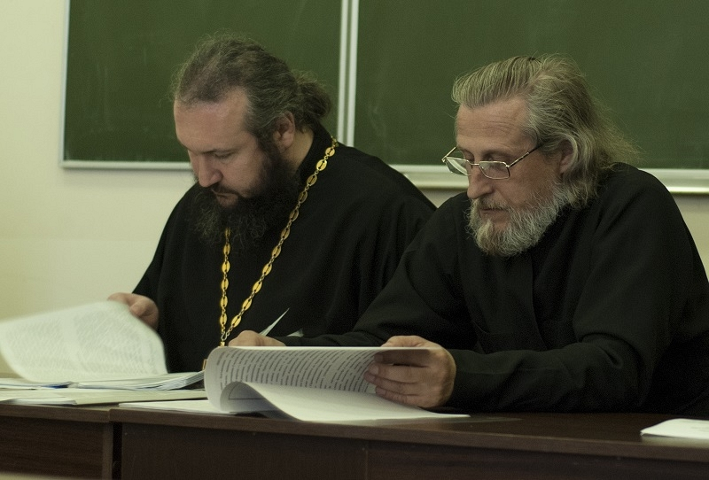 Первый проректор СПДС игумен Варфоломей (Денисов) и преподаватель семинарии протодиакон Михаил Беликов на предзащите курсовых работ 2013г